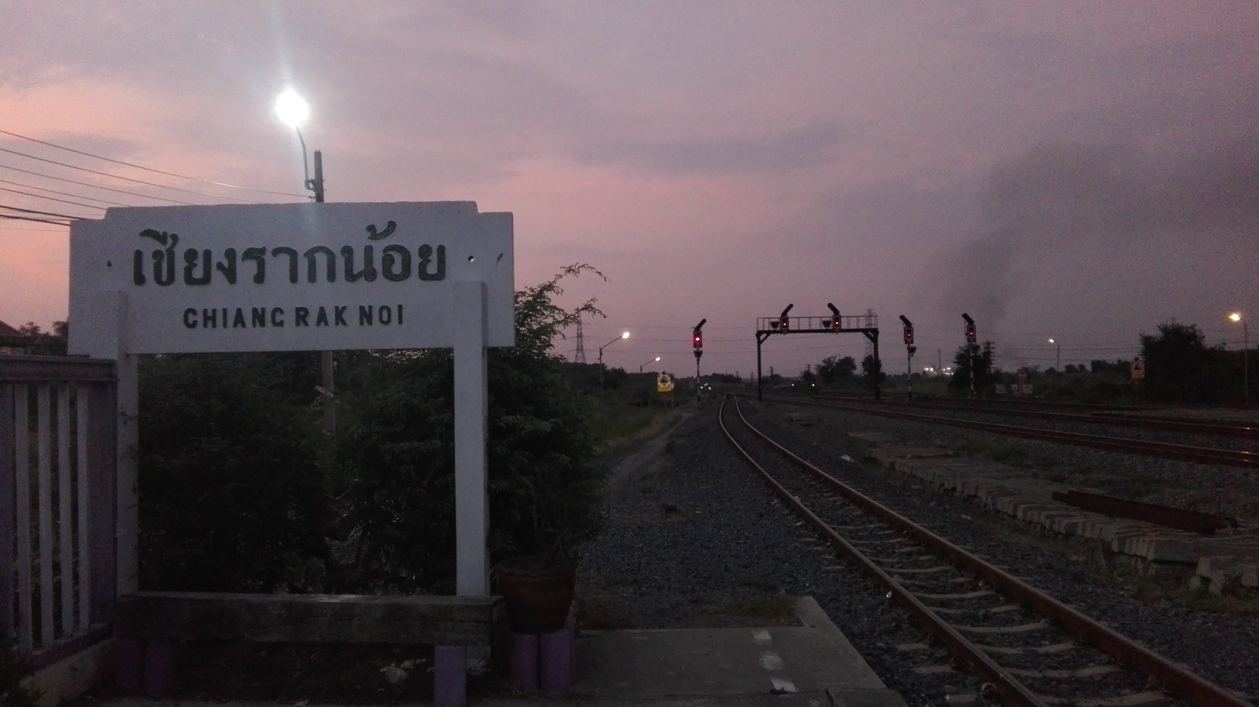 ป้ายสถานีทางเหนือ